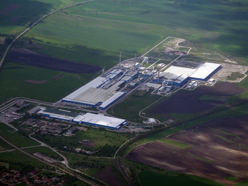 Trakia Glass